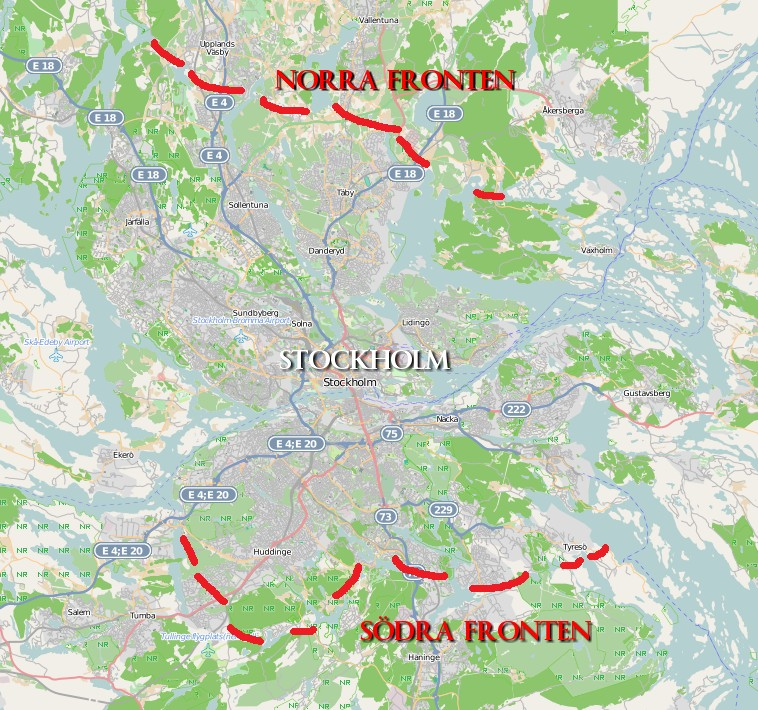 Korvlinjen med Norra och Södra Fronten från första världskriget inlagd på en modern karta från Open Street Map This map may be incomplete, and may contain errors. Don't rely solely on it for navigation.